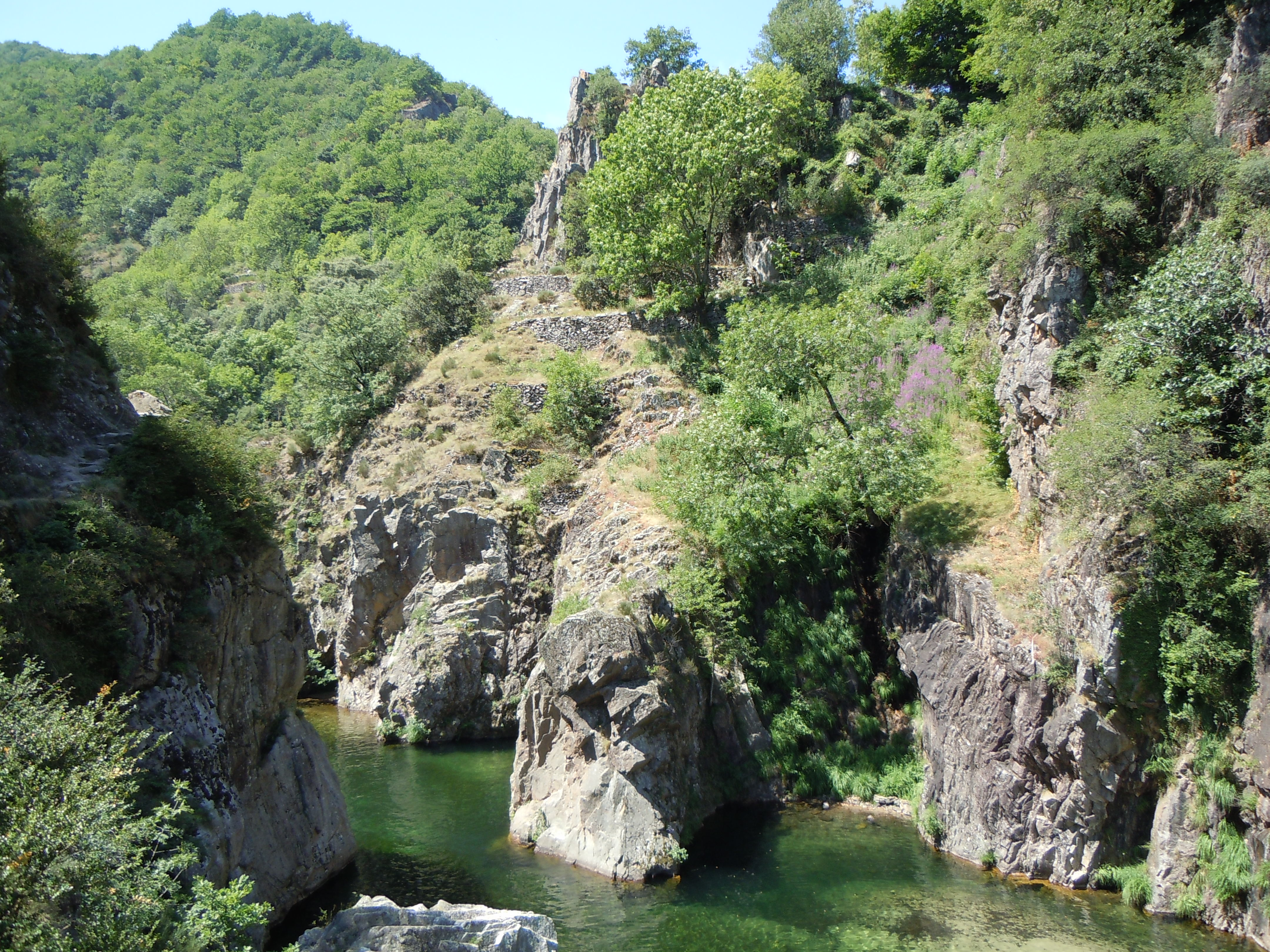 Haute Vallée de l'Ardèche au Pont du Diable - Thueyts - Ardèche - France